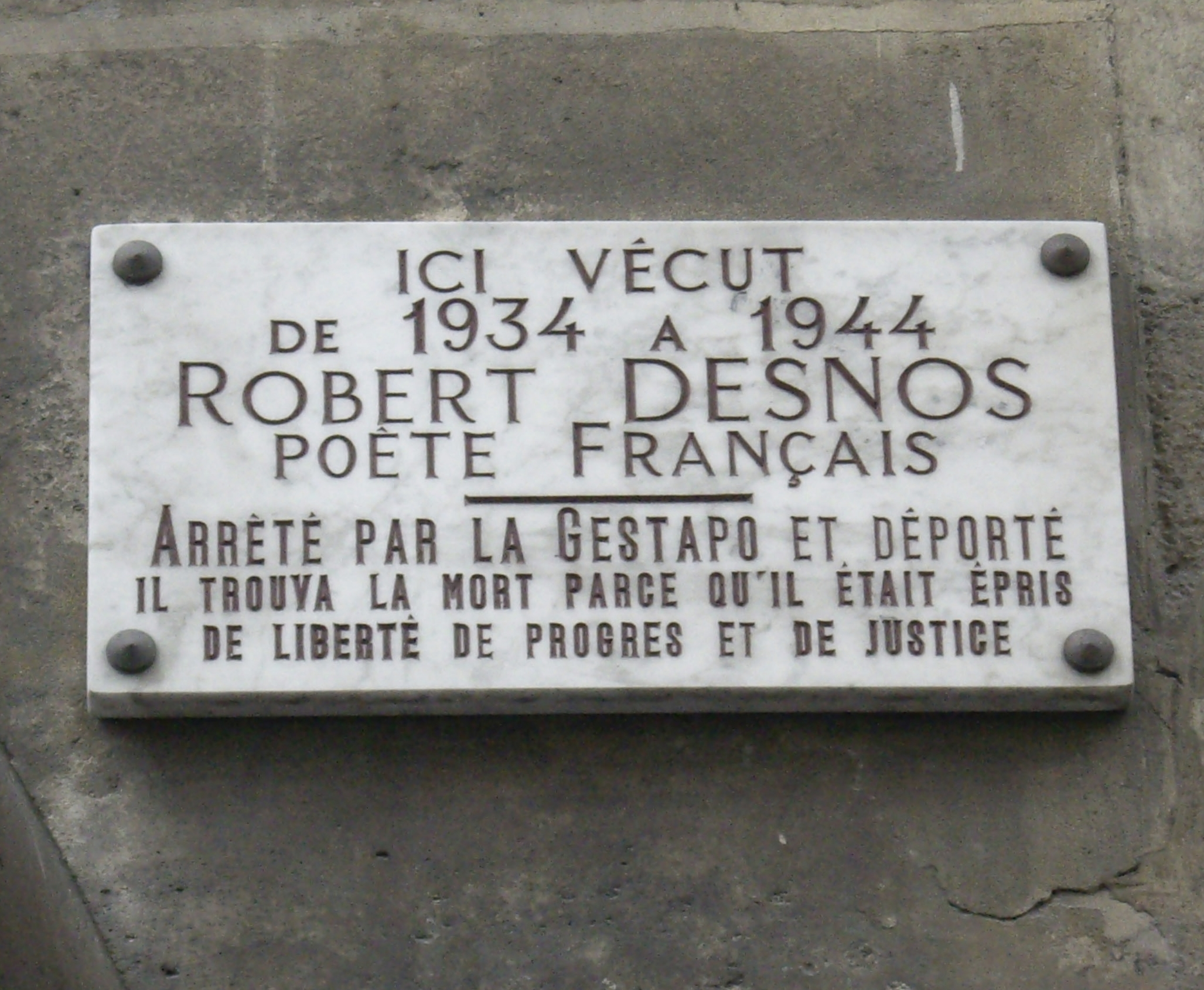 Plaque apposée au n° 19 de la rue Mazarine, Paris 6e. « Ici vécut de 1934 à 1944 Robert Desnos, poète français. Arrêté par la Gestapo et déporté, il trouva la mort parce qu'il était épris de liberté, de progrès et de justice. »